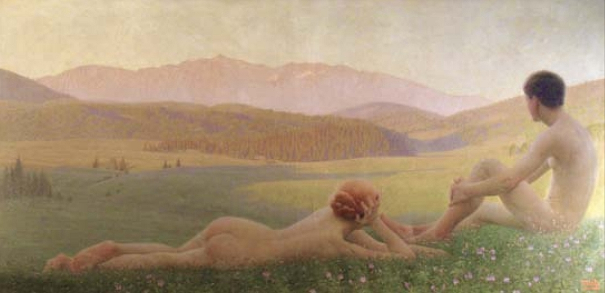 Friedrich Miess - Primavara (Dimineața)